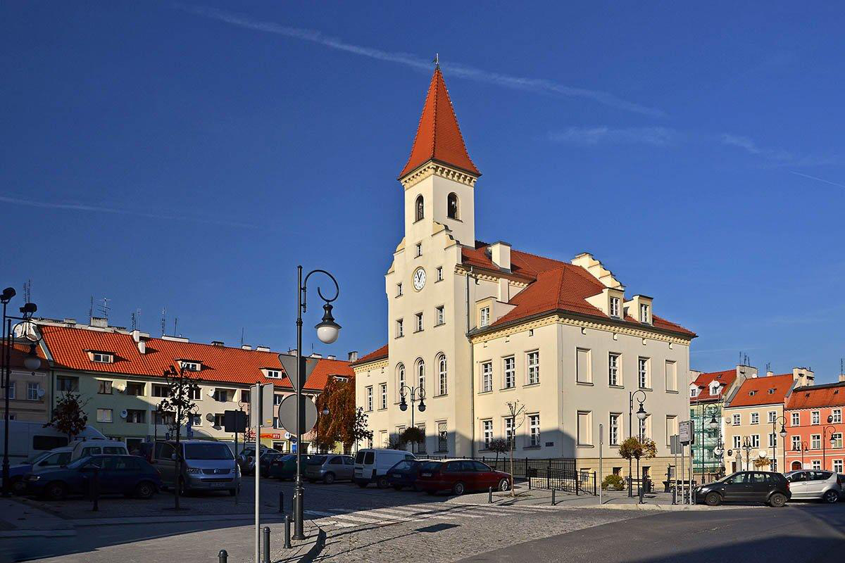 Ratusz